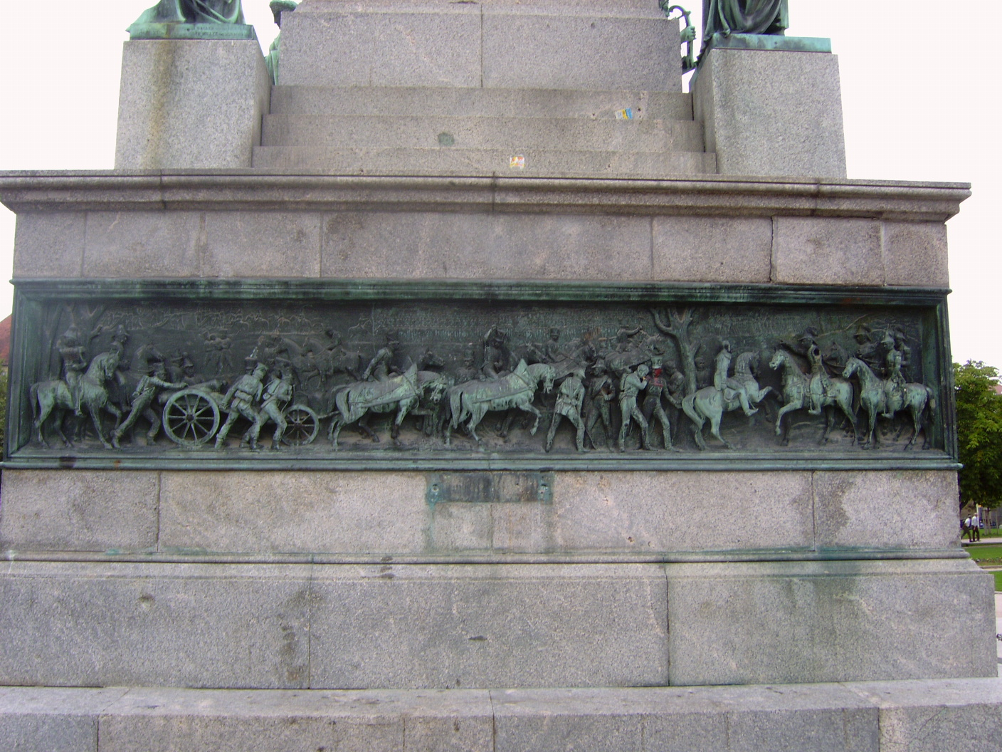 Stuttgart Mitte, Schloßplatz, Flst.Nr. 660/1, Jubiläumssäule, Theodor Wagner, 1860 – 1870; Seitenrelief "Die Schlacht von Brienne am 1. Februar 1814"